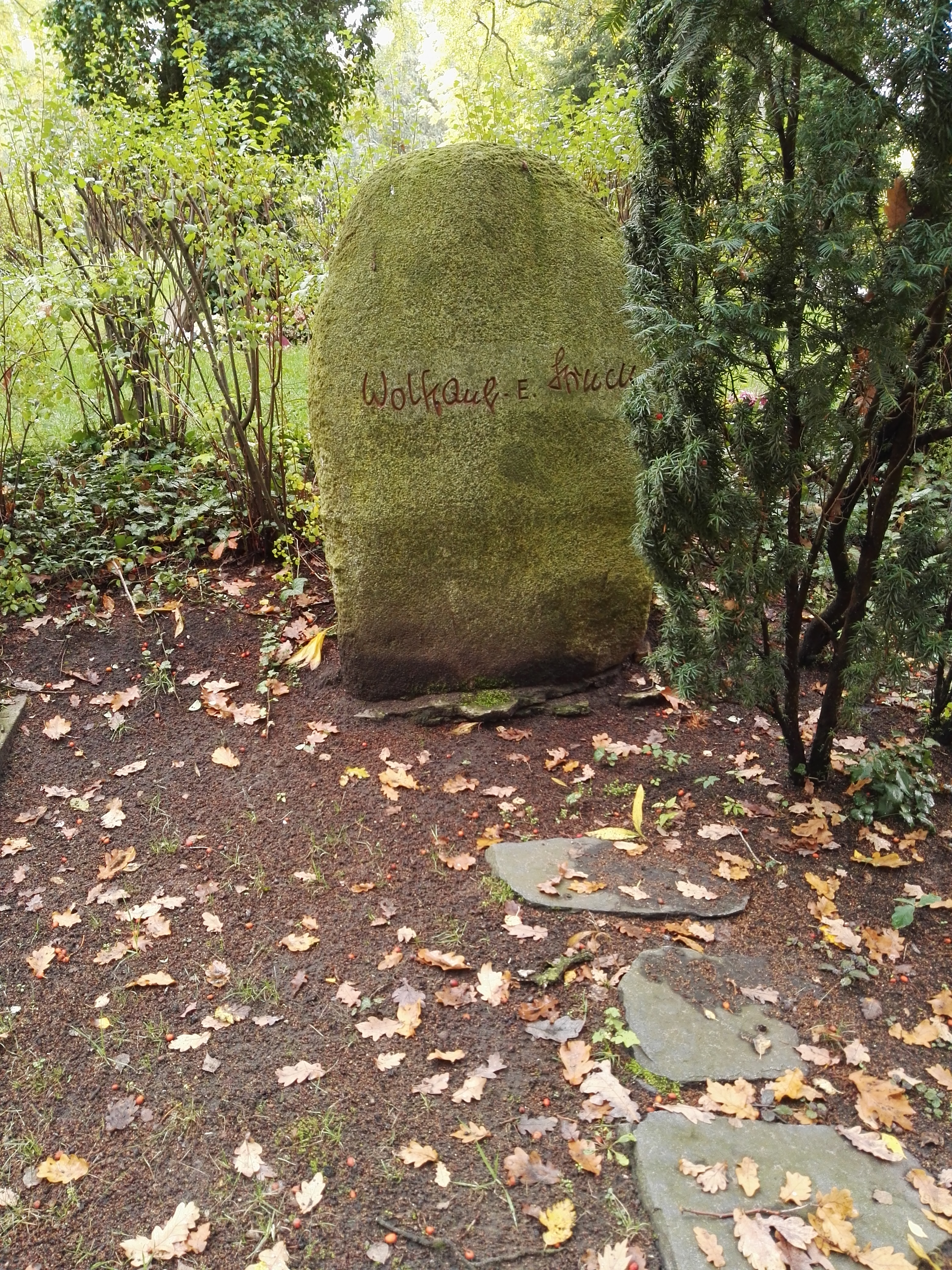 Grab von Wolfgang E. Struck auf dem Zentralfriedhof Friedrichsfelde